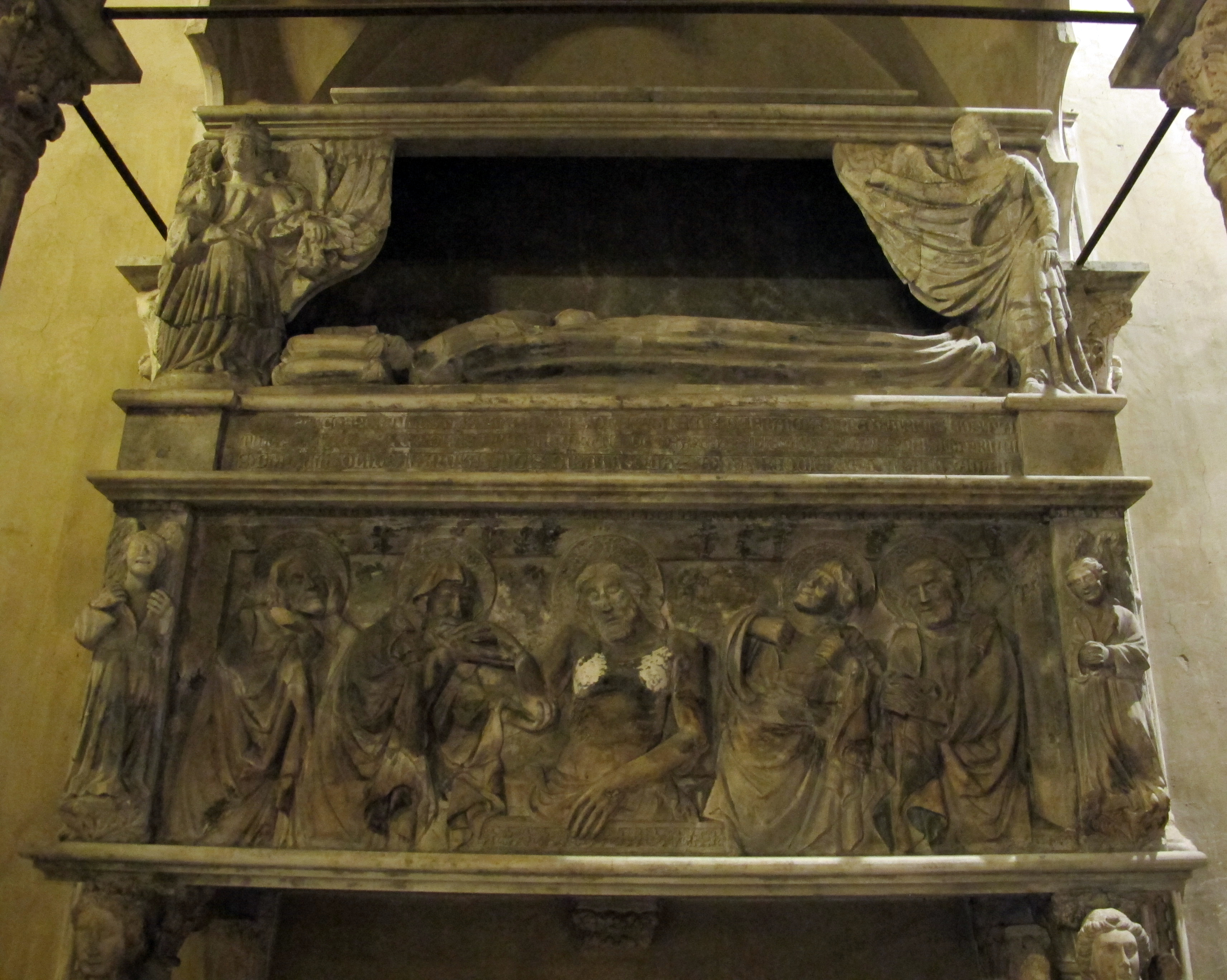 Santa Chiara, Napoli